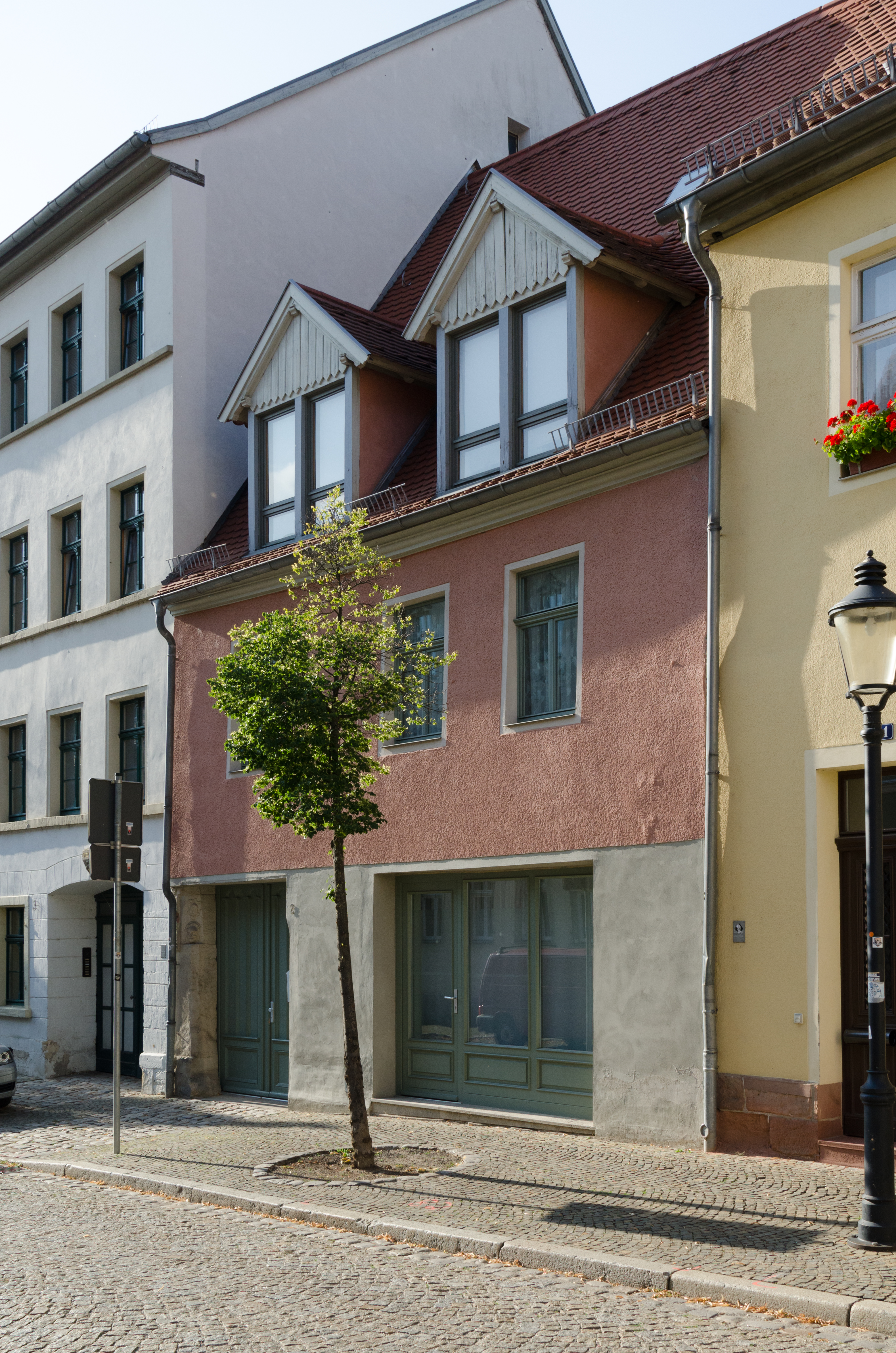 Naumburg, Fischstraße 2